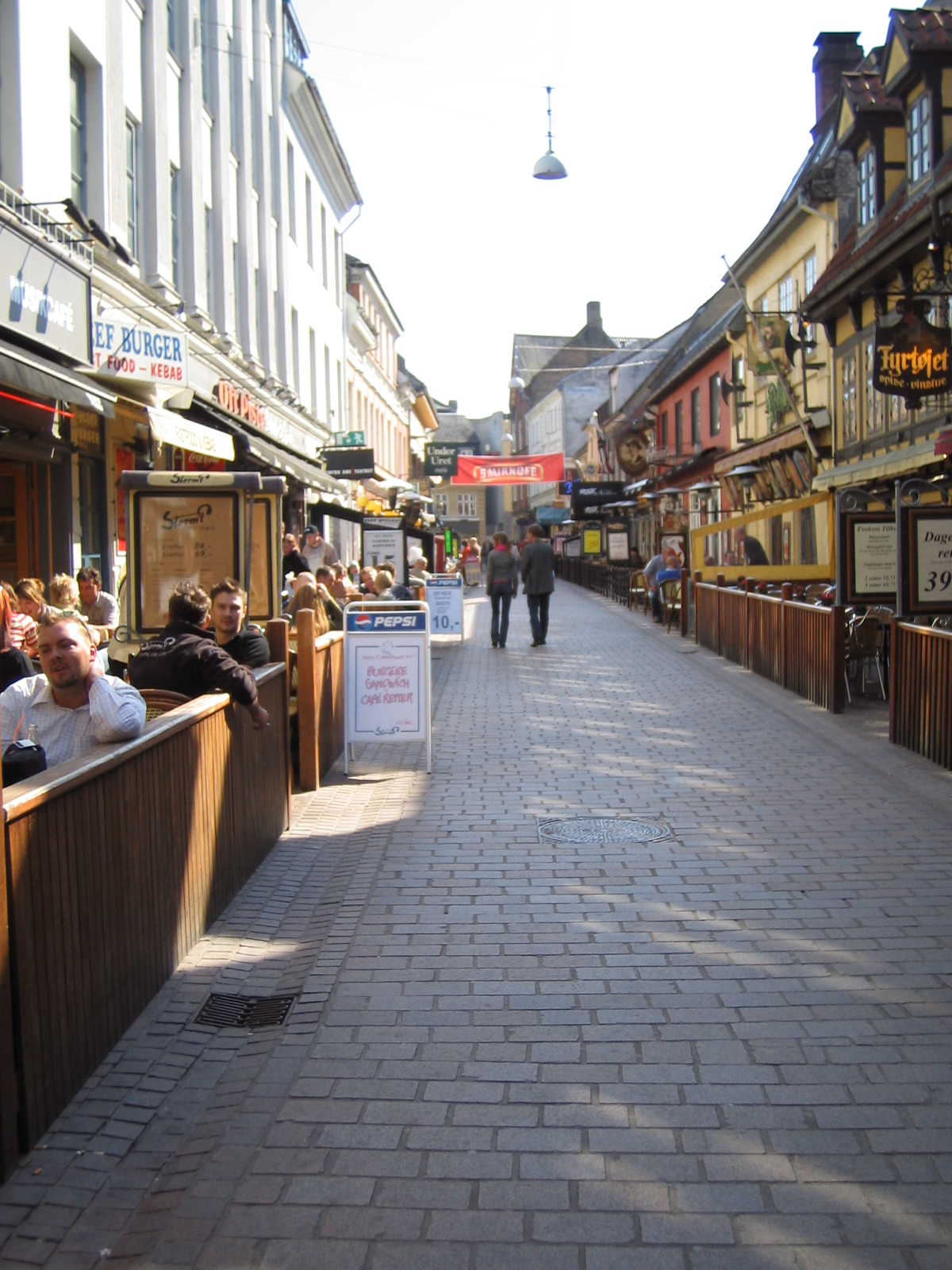 Jomfru Ane Gade. Aalborg, Denmark